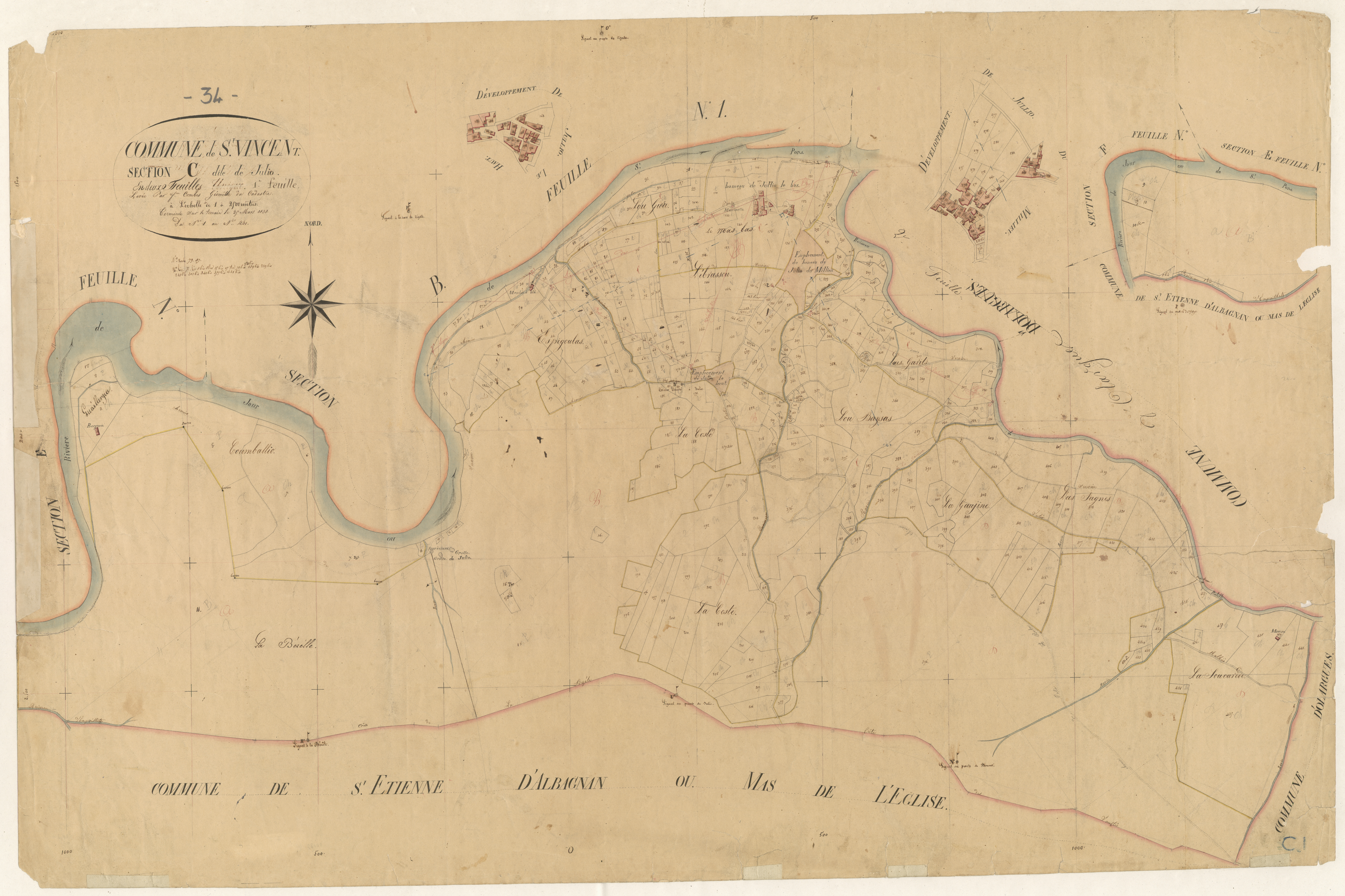 Saint-Vincent-d'Olargues. - Cadastre napoléonien : section C1 de Julio.